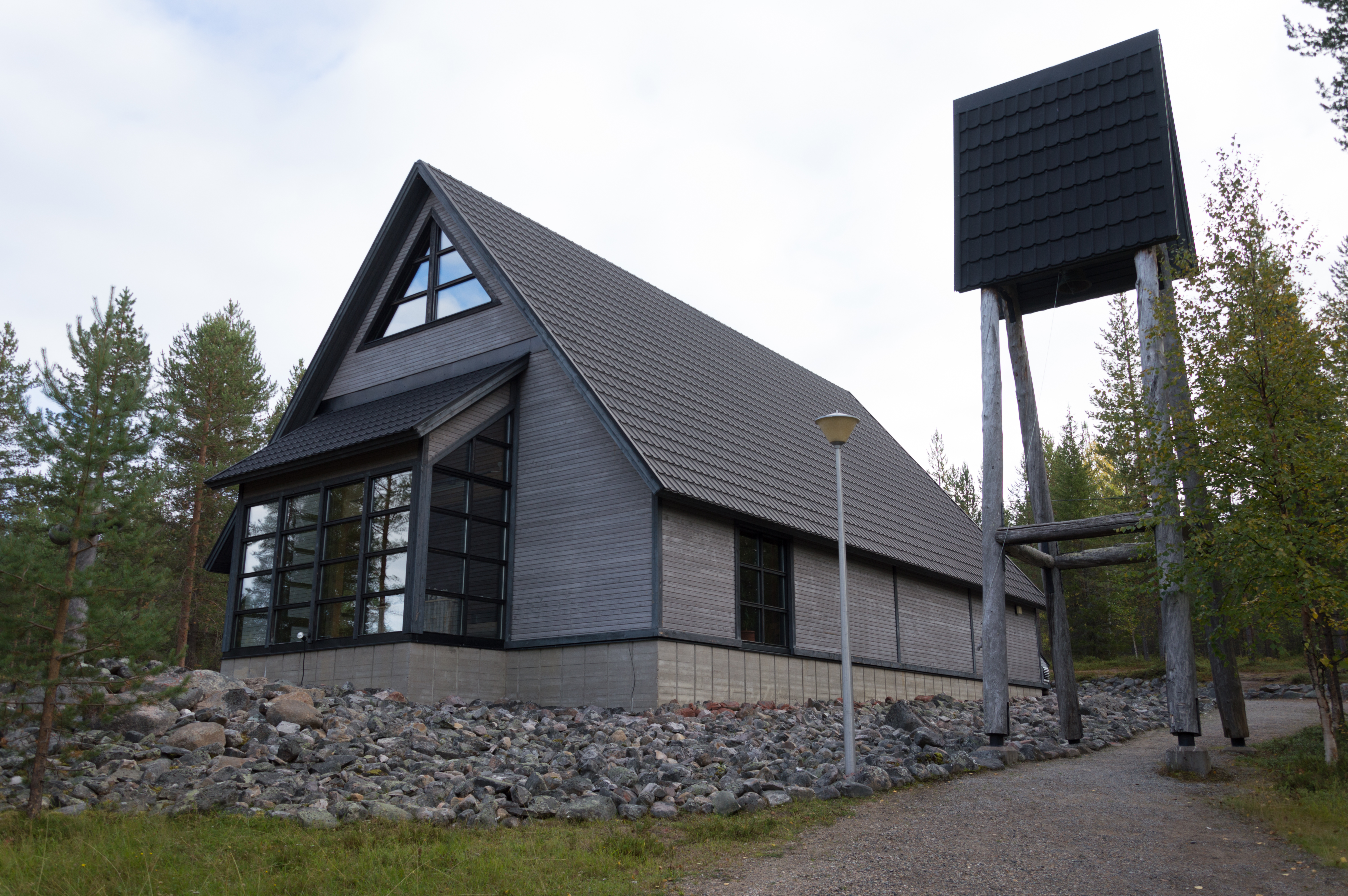 Revontulikappeli Pyhätunturilla